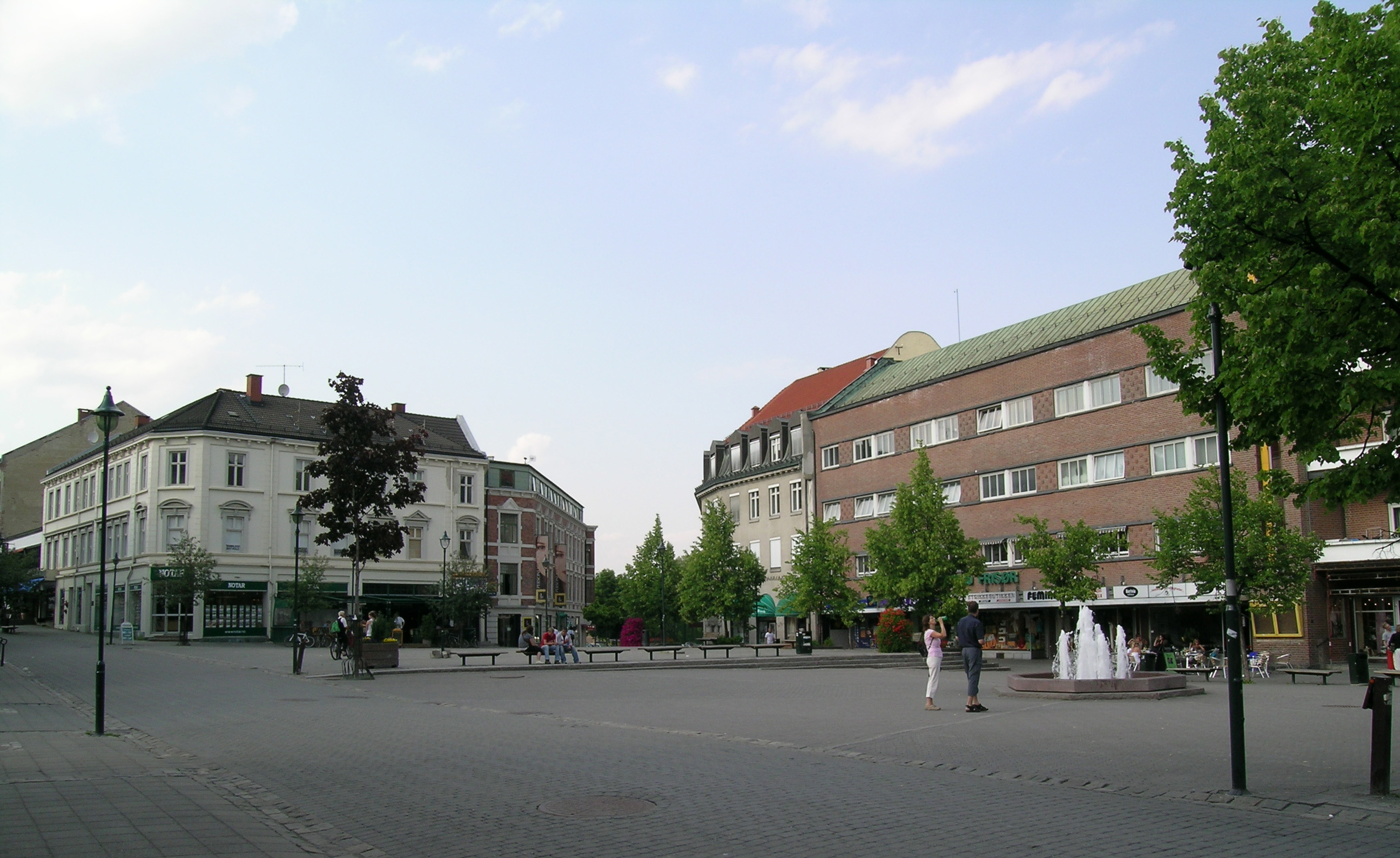 Hønefoss, Ringerike. Søndre torv. Own work